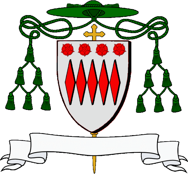 En argant e femp gwerzhidenn en gwad treustellet ha kenstag, heuliet ouzh kab gant peder rozenn iverz en gwead